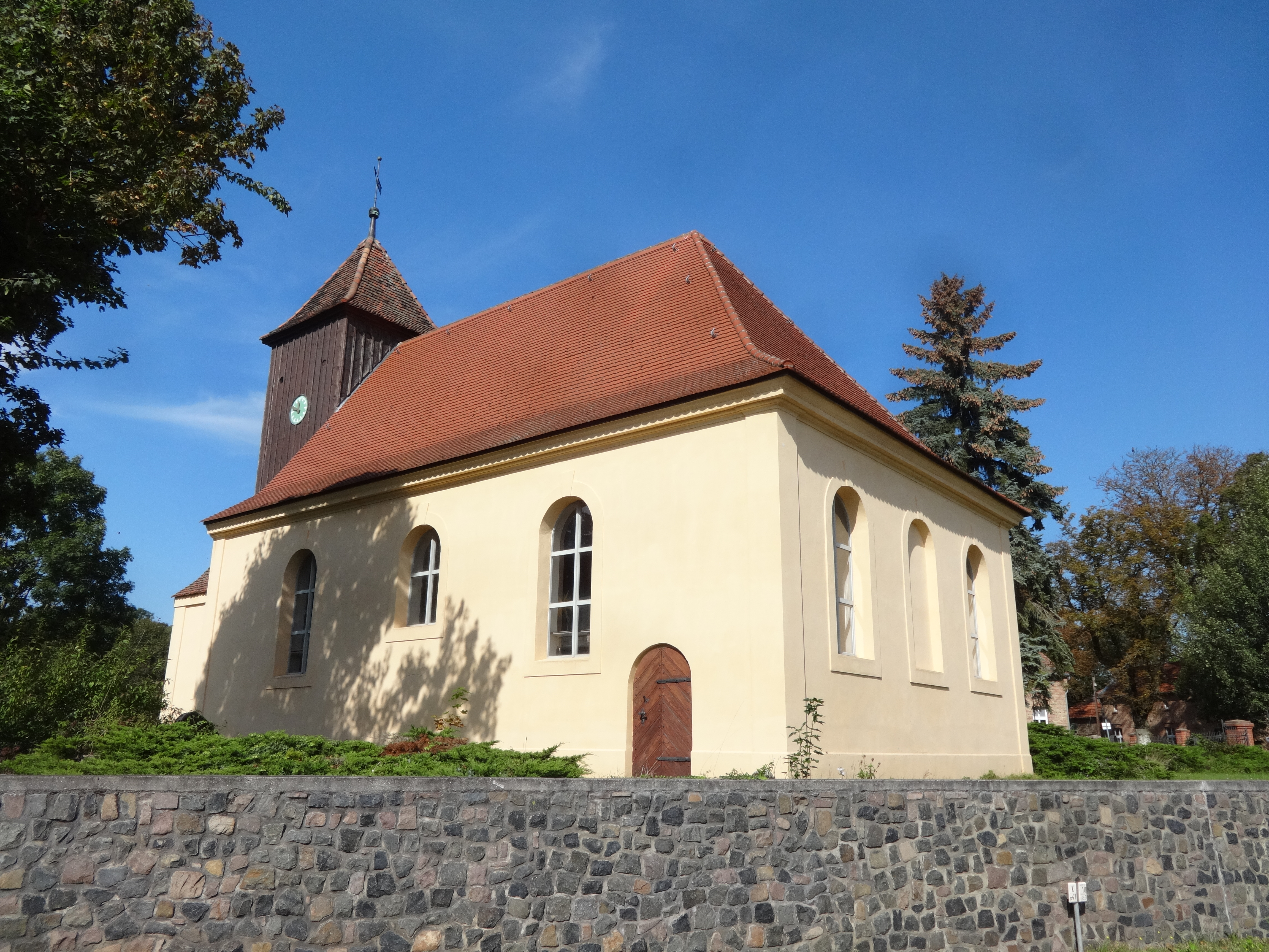 Die Dorfkirche Löwenbruch ist eine Saalkirche aus dem Jahr 1716 in der Stadt Ludwigsfelde im Landkreis Teltow-Fläming im Land Brandenburg. Im Innern stehen unter anderem ein Kanzelaltar aus dem Jahr 1719 sowie eine Taufe aus dem Jahr 1670.